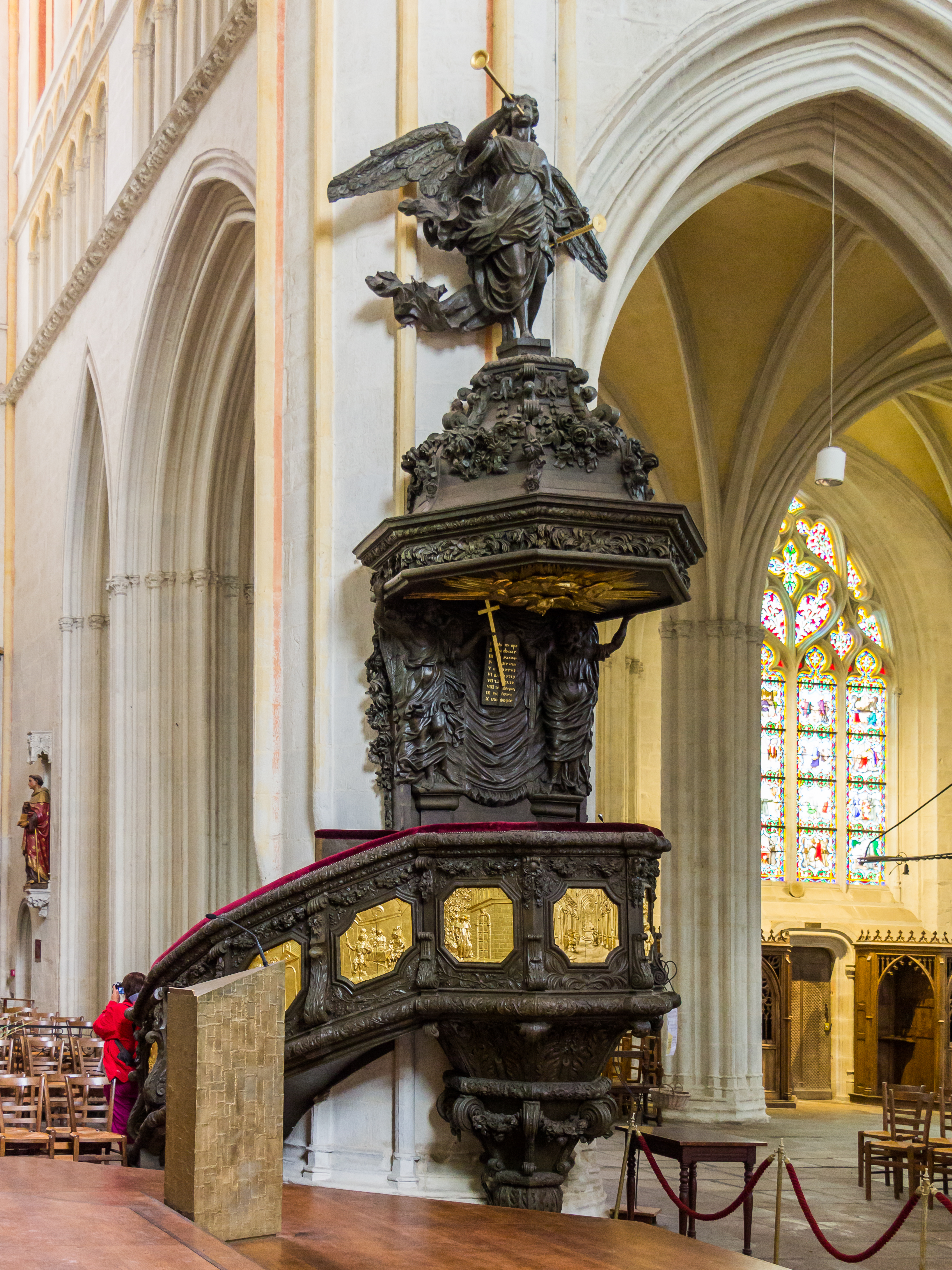 Cathédrale Saint-Corentin de Quimper